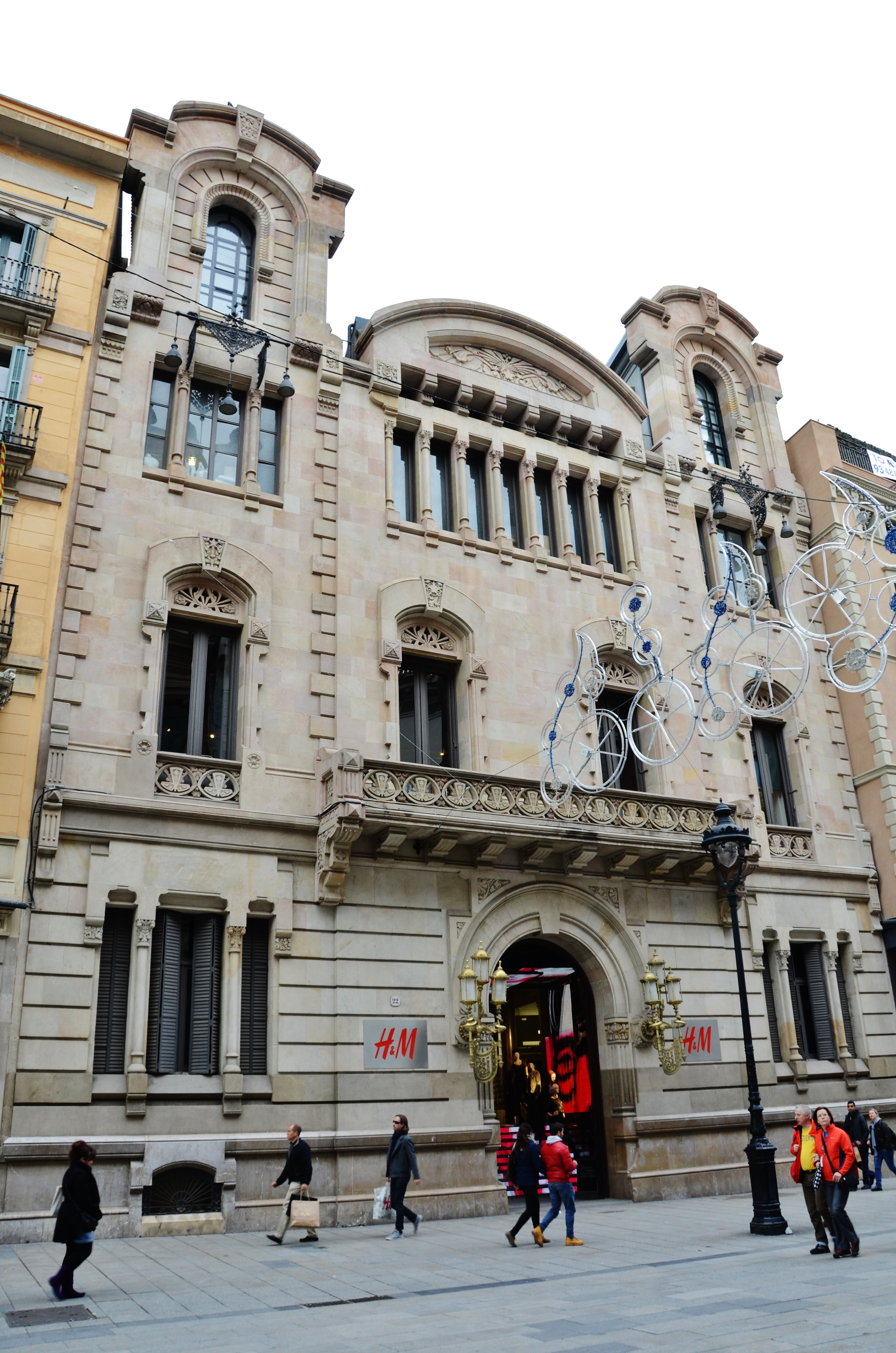 Catalana de Gas i Electricitat (ara Gas Natural, Barri Gòtic, Barcelona